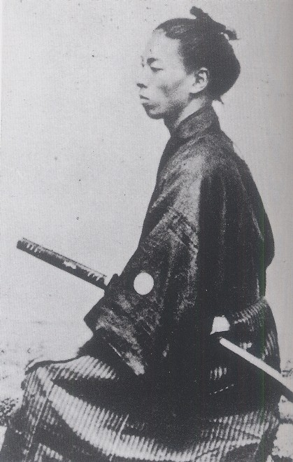 田中光顕 Tanaka Mitsuaki 京都にて撮影されたもの。